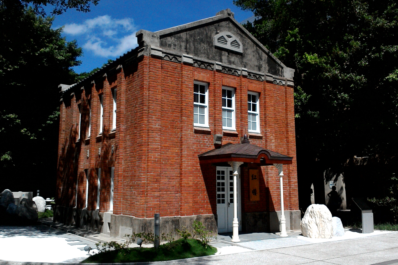 台北工業學校紅樓,台北市大安區新生次分區民輝里